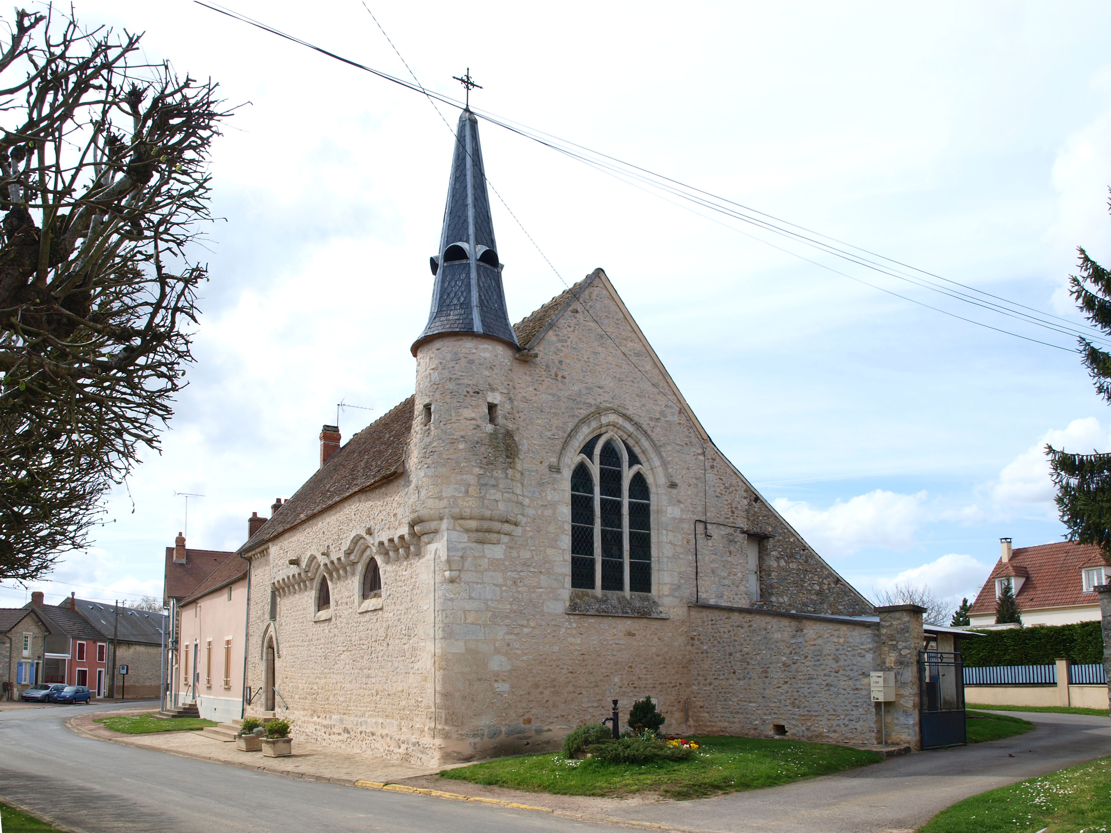 Plessis-Saint-Benoist (Essonne, France) ; église Saint-Louis.